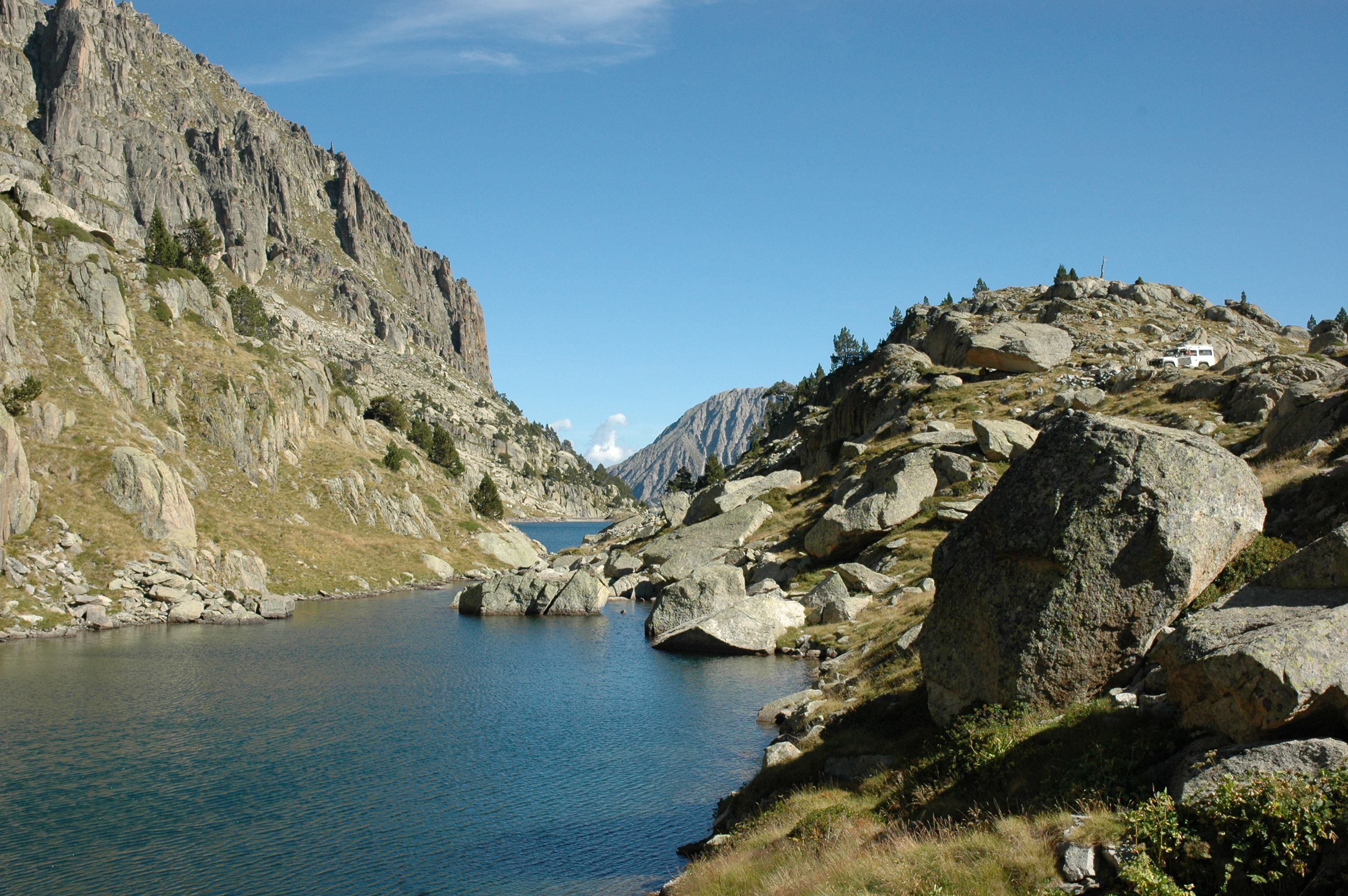 Estany de la Munyidera